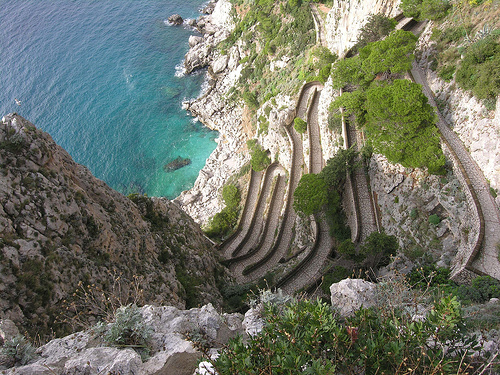 Capri, Campania, Italia